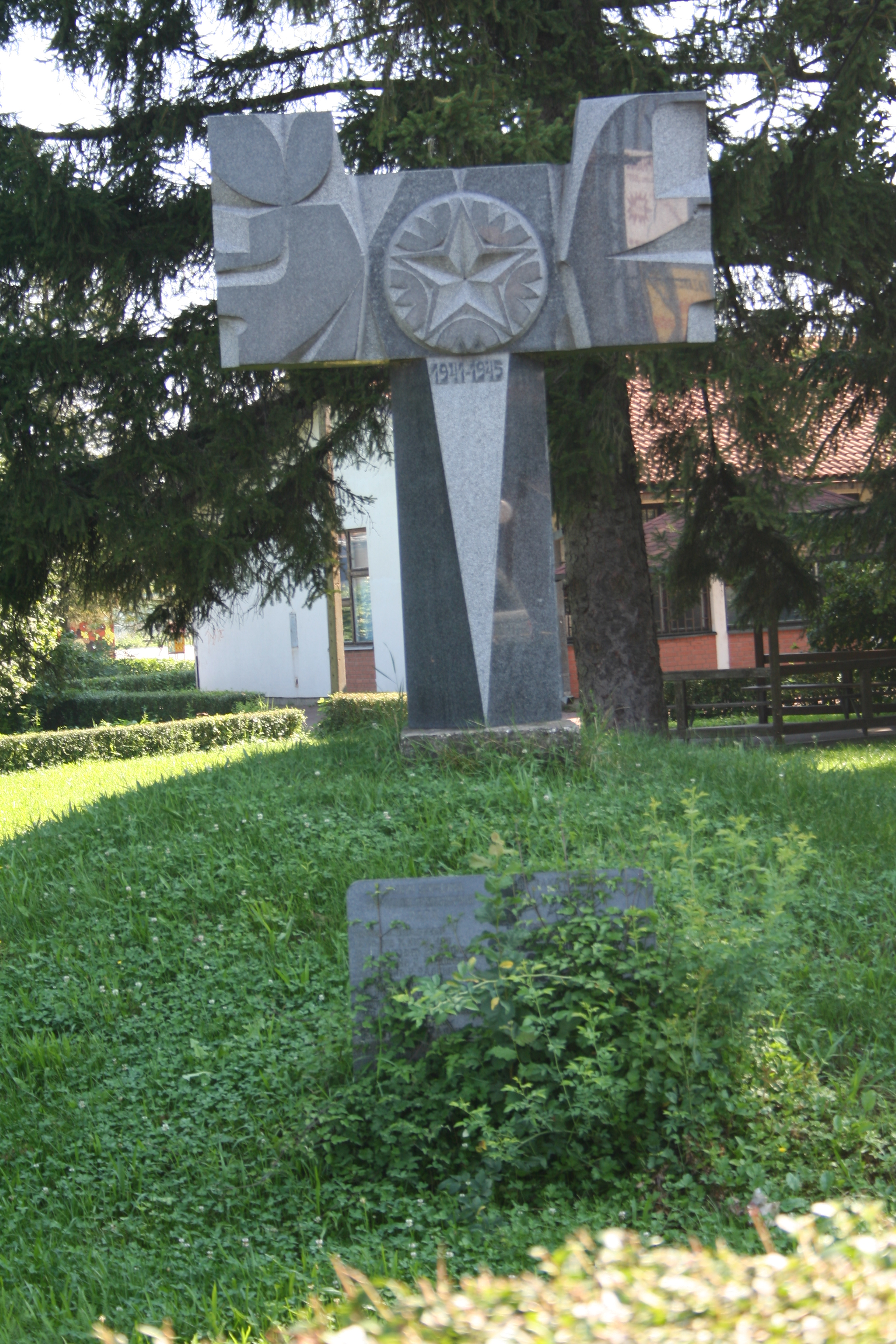 Spomenik NOB-a, Lipnički Šor